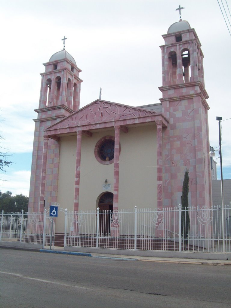 Santuario de Nuestra Señora de Guadalupe (Meoqui, Chihuahua)